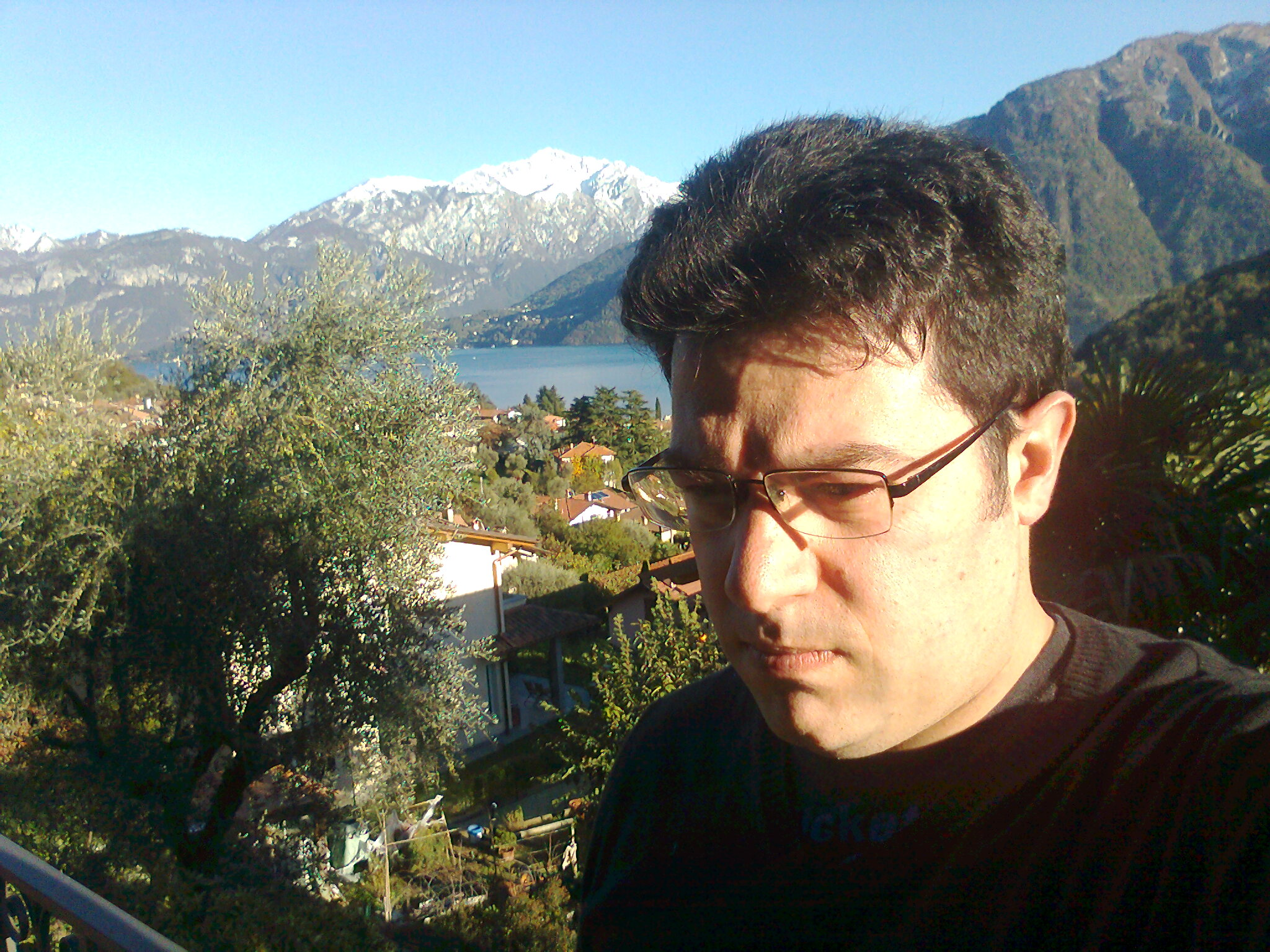 Giovanni Cocco nel 2013.